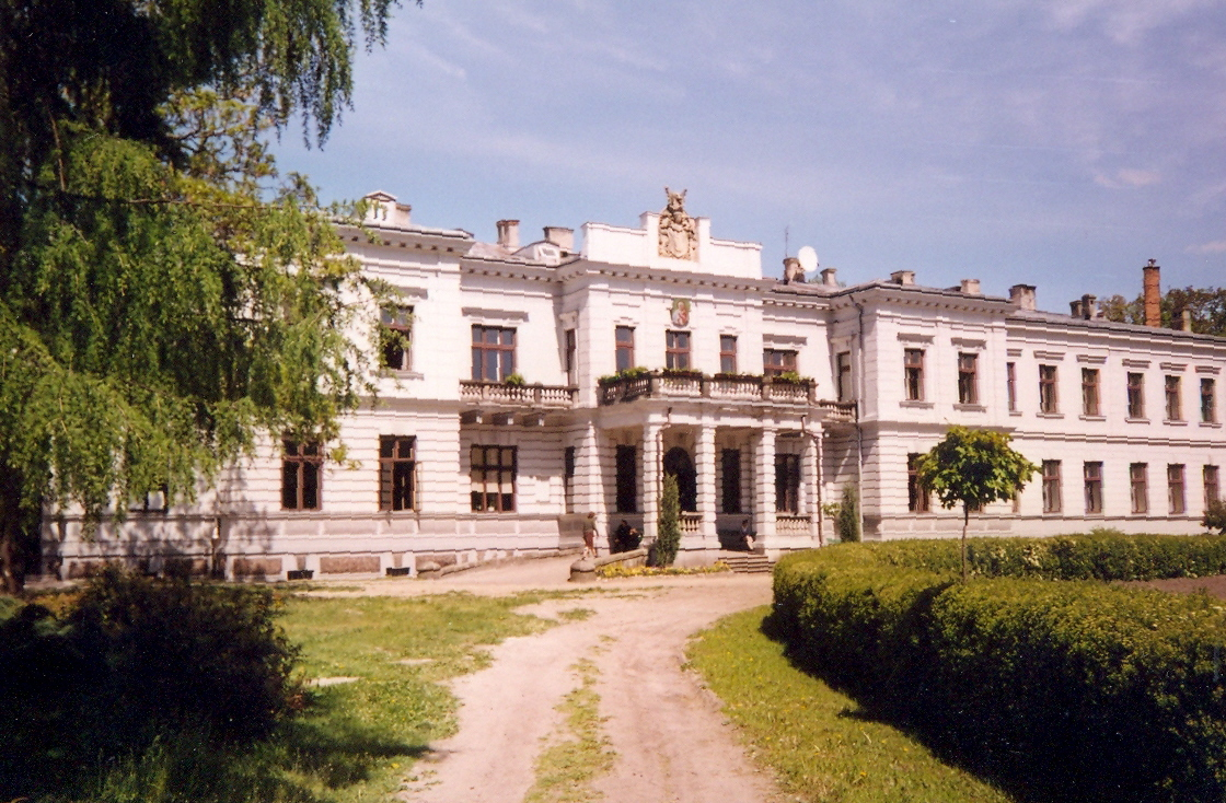 Pałac w Szymanowie (zabytek nr rejstr. 92/17/57)